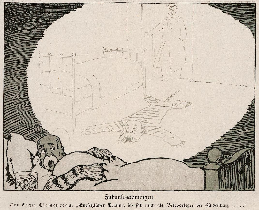 „Zukunftsahnungen: Der Tiger Clemenceau: 'Entsetzlicher Traum: ich sah mich als Bettvorleger bei Hindenburg...'“ (Karikatur in: Jugend. Münchner illustrierte Wochenschrift für Kunst und Leben, Heft 1/1918 S. 19)